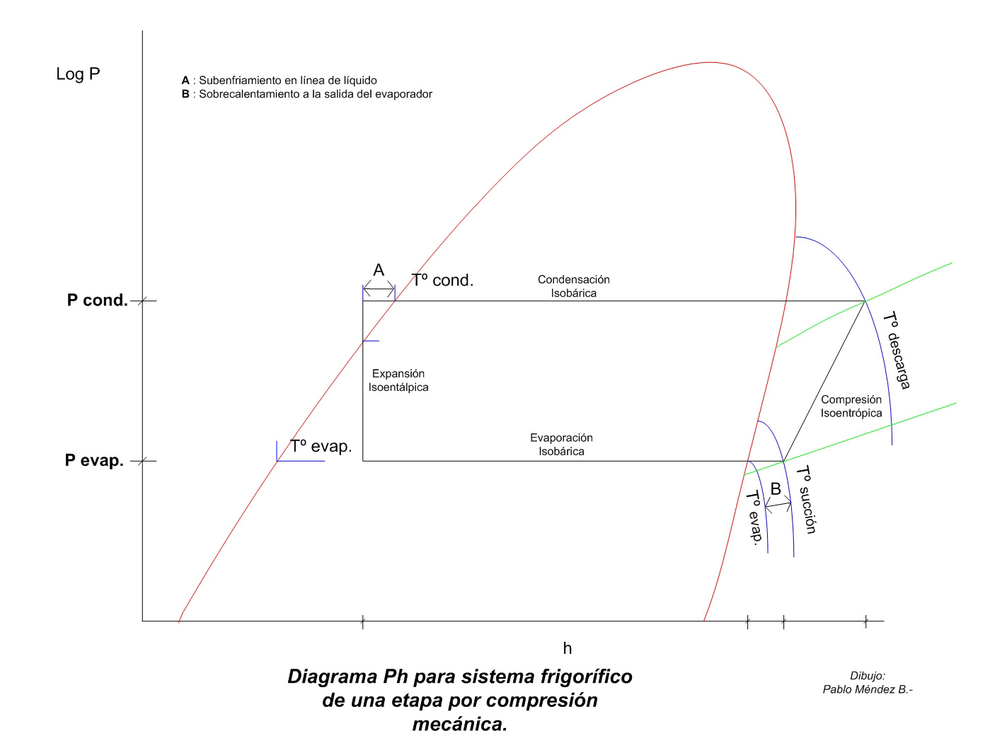 Diagrama Ph de sistema frigorífico de simple etapa y expansión seca.